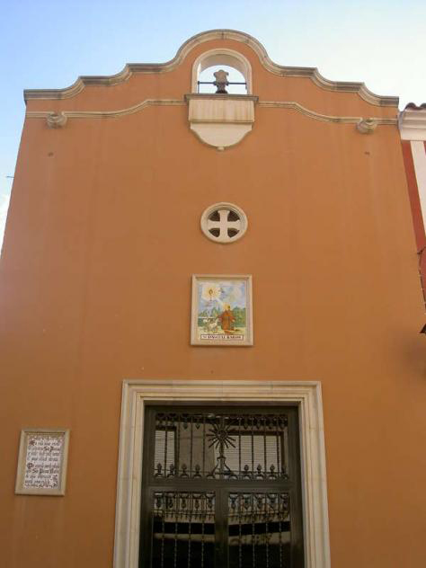 Fachada de la Ermita de San Pascual, sita en la plaza de San Pascual de Monforte del Cid